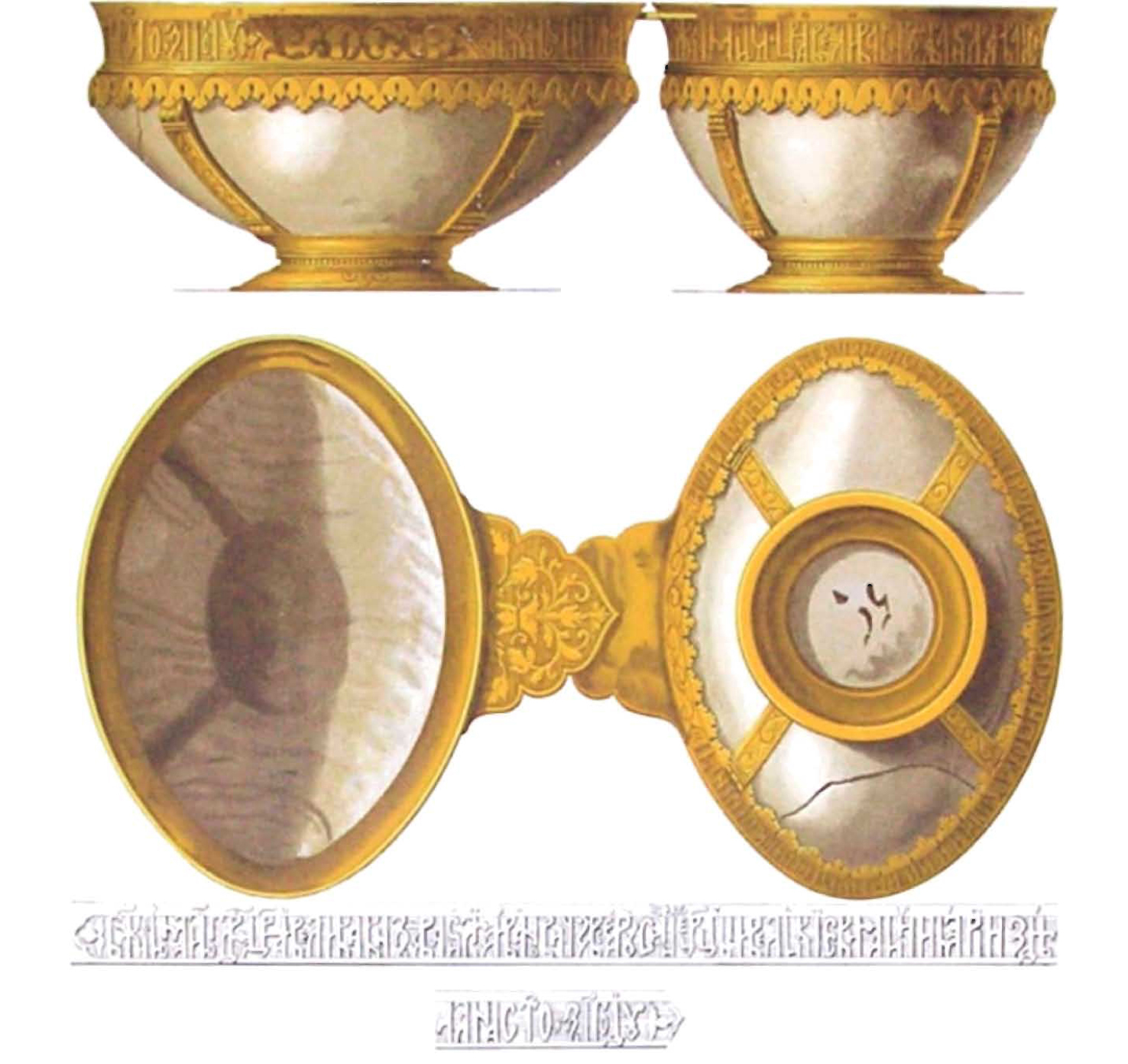 Древности Российского государства (Antiquities of Russian country), 1846—1853. Иллюстратор — Солнцев, Фёдор Григорьевич. Чарка раковинная Царицы Марии Петровны, супруги Царя Василия Ивановича Шуйского. Рисунок Отд. V. № 33 - Чарка раковинна царицы Марии Петровны, супруги царя Василия Ивановича Шуйского. Чарка сердоликовая Царя Михаила Феодоровича. Рисунок Отд. V. № 33